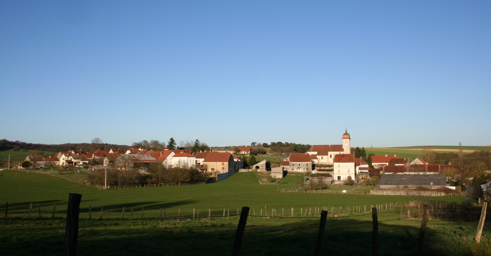 Vue d'ensemble sur le village